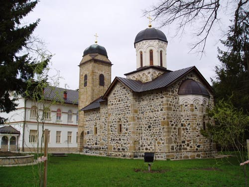 Манастир Светог Николе на Озрену (Република Српска)